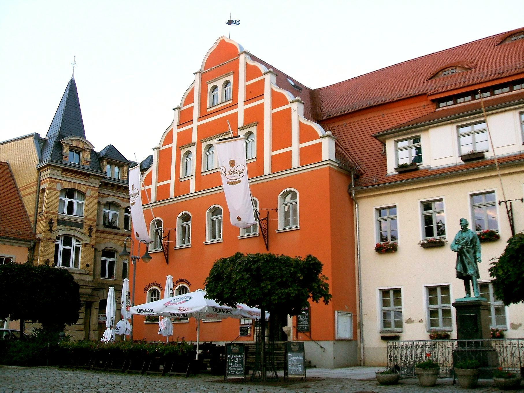 Altes Rathaus mit Ratskeller sowie Ernst Rietschel Denkmal in Pulsnitz